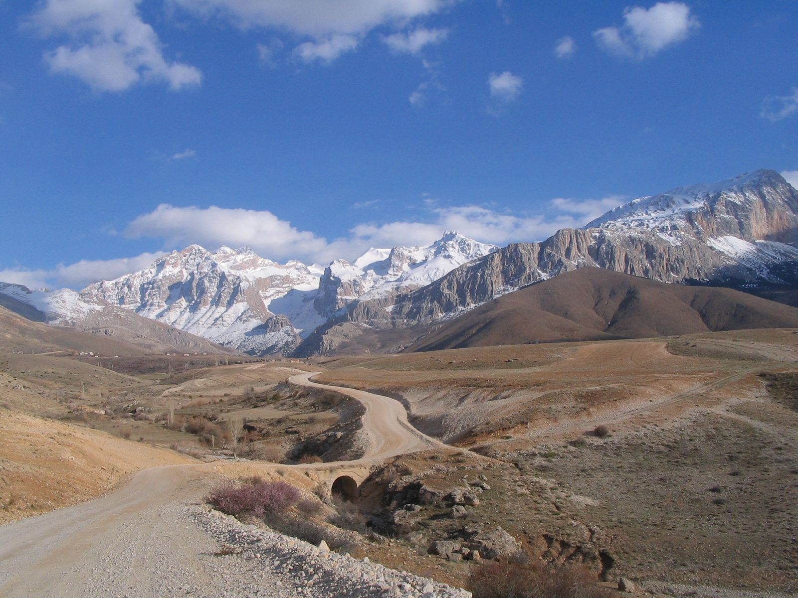 A detail of Aladağlar range (Anti-Taurus) in middle Turkey.